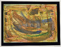 Das alte Schiff